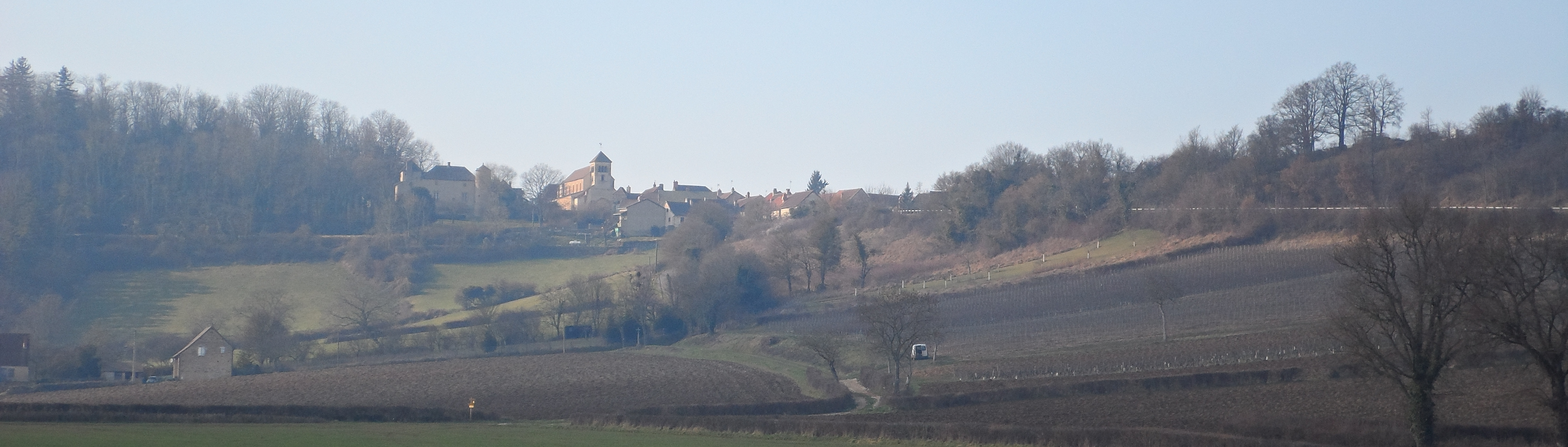 Paysage du village de saint yhtaire en 2013